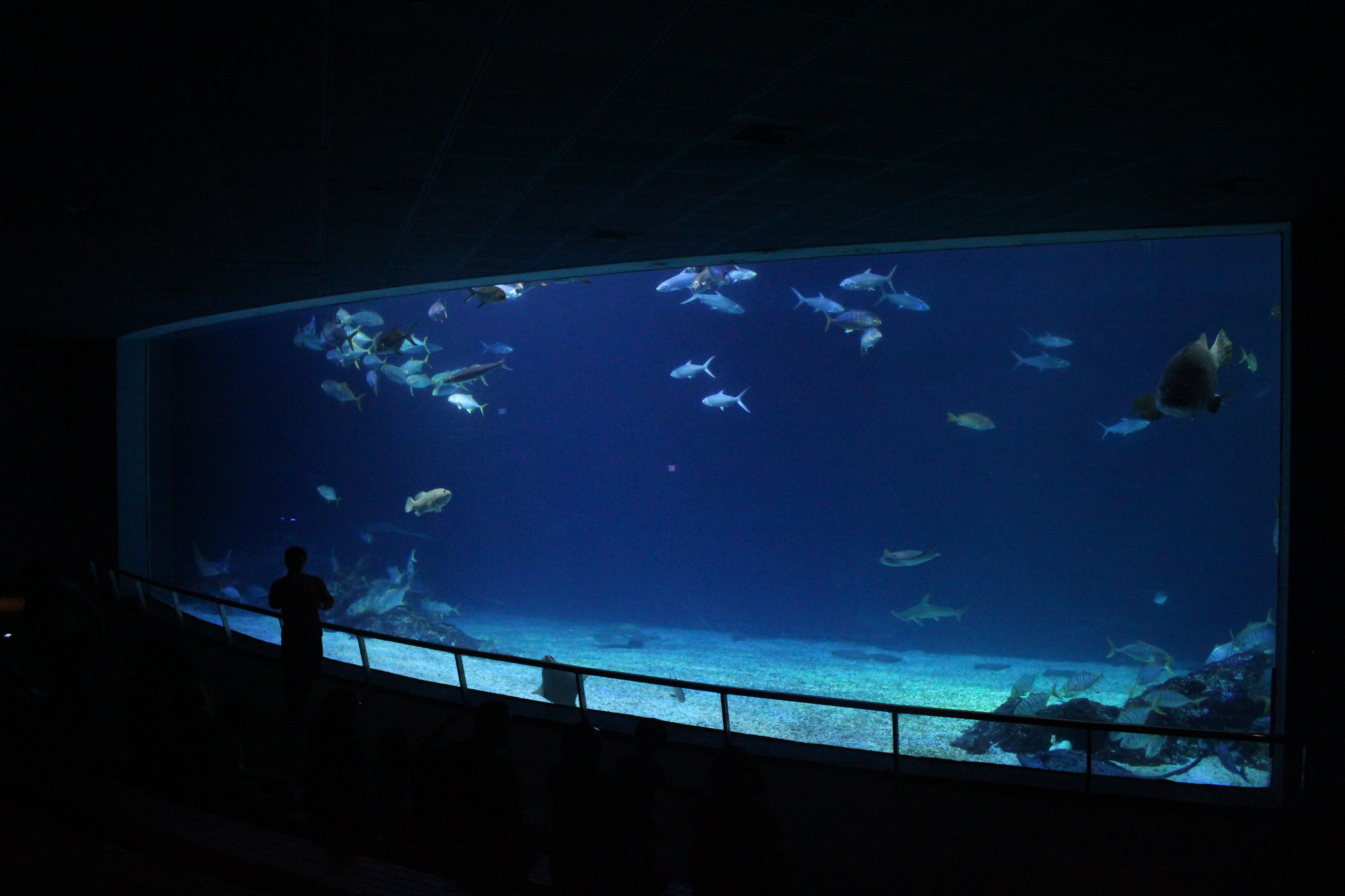 國立海洋生物博物館臺灣水域館大洋池。